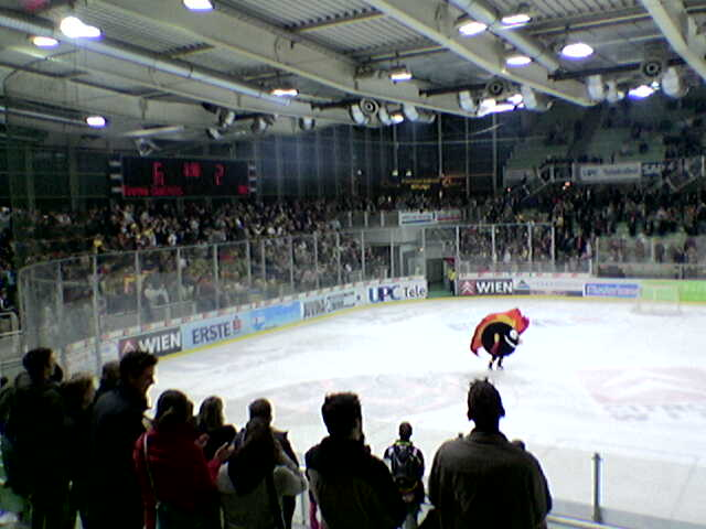 Description: Patinoire de Vienne lors d'un match à domicile de l'équipe de hockey sur glace des Vienna Capitals. Date: hiver 2004 Licence: photographie par Witoki sous